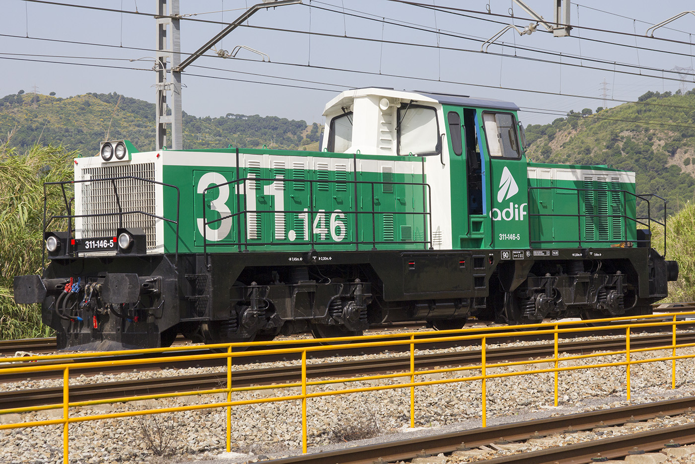 Estacionat a l'estació de Castellbisbal a l'espera de fer un servei.